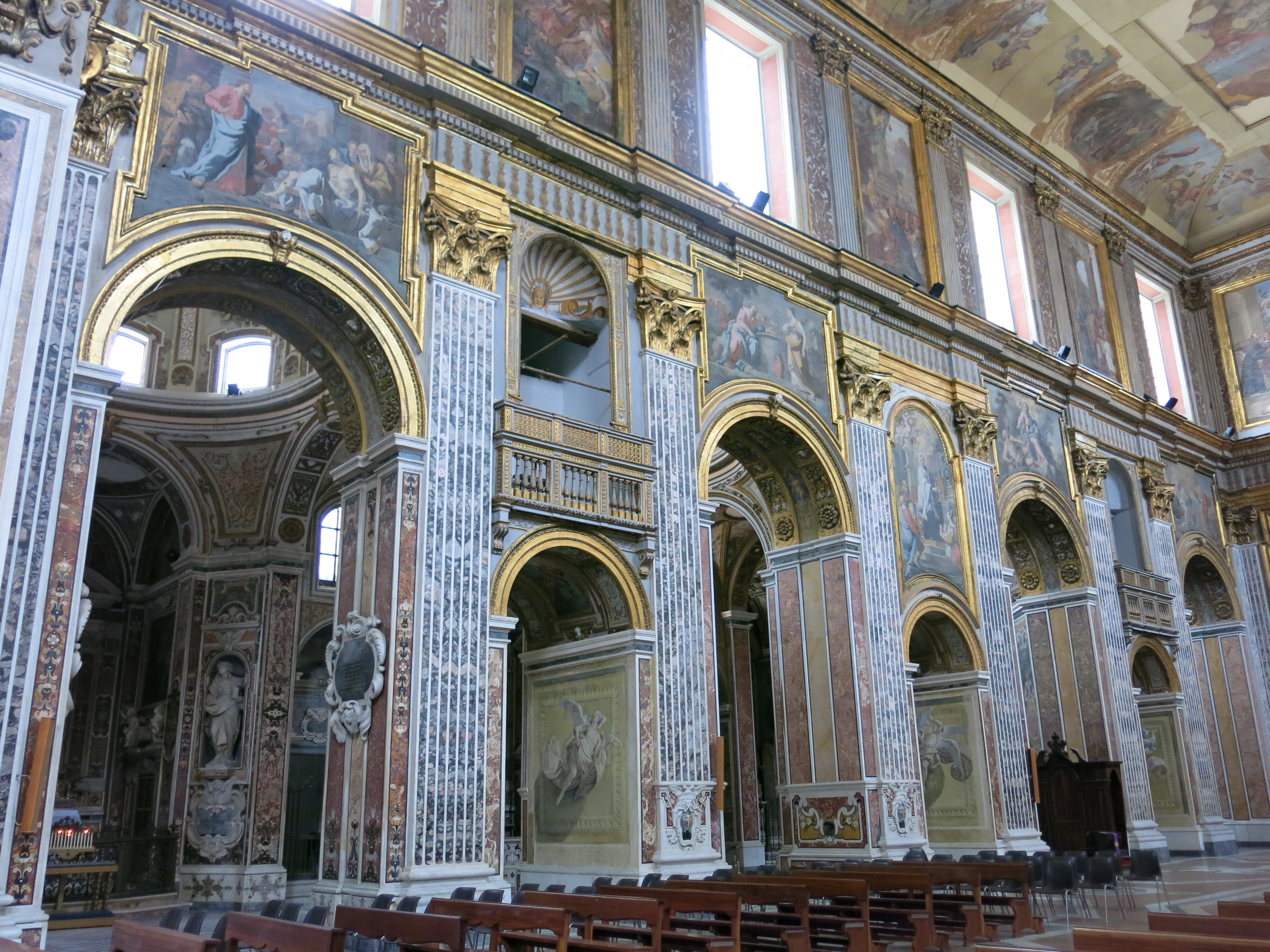 Le chiese di Napoli